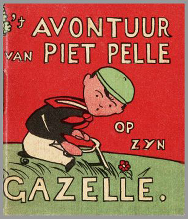 Piet Pelle op zijn Gazelle. Oorspronkelijke uitgave 1912